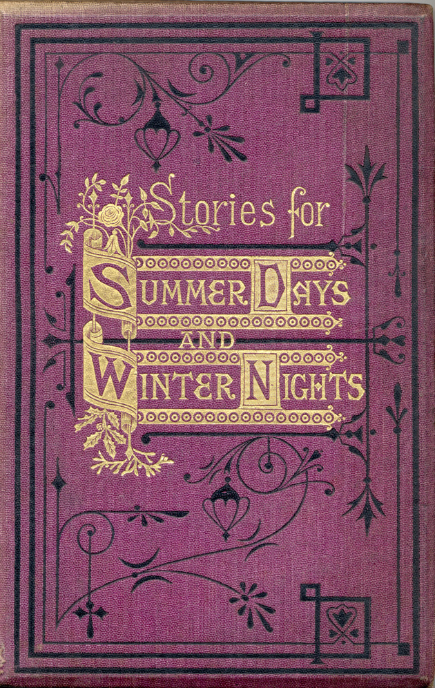 Stories for summer days and winter nights illustrated with coloured plates and wood engravings Lydon, A. F ( Alexander Francis ) ( Illustrateur ) Whymper, Elijah, ( graveur ) Groombridge and Sons ( Editeur ) Publié en 1873